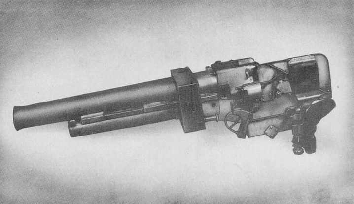 canon de 57mm type 97 du char Chi-Ha type 97